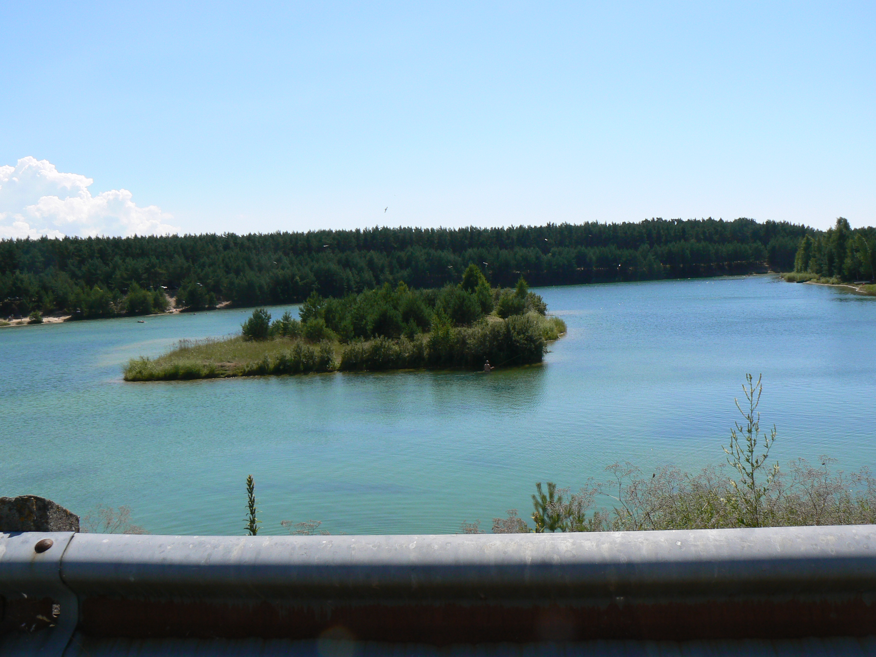 Jezero (Nejzápadnější z trojice blízkých) ve vsi Kunigiškiai z ulice Kunigiškių gatvė. Pohled od severu, od letiště Palanga. Toto jezero prostřednictvím bezejmenného přítoku napájí Ošupis